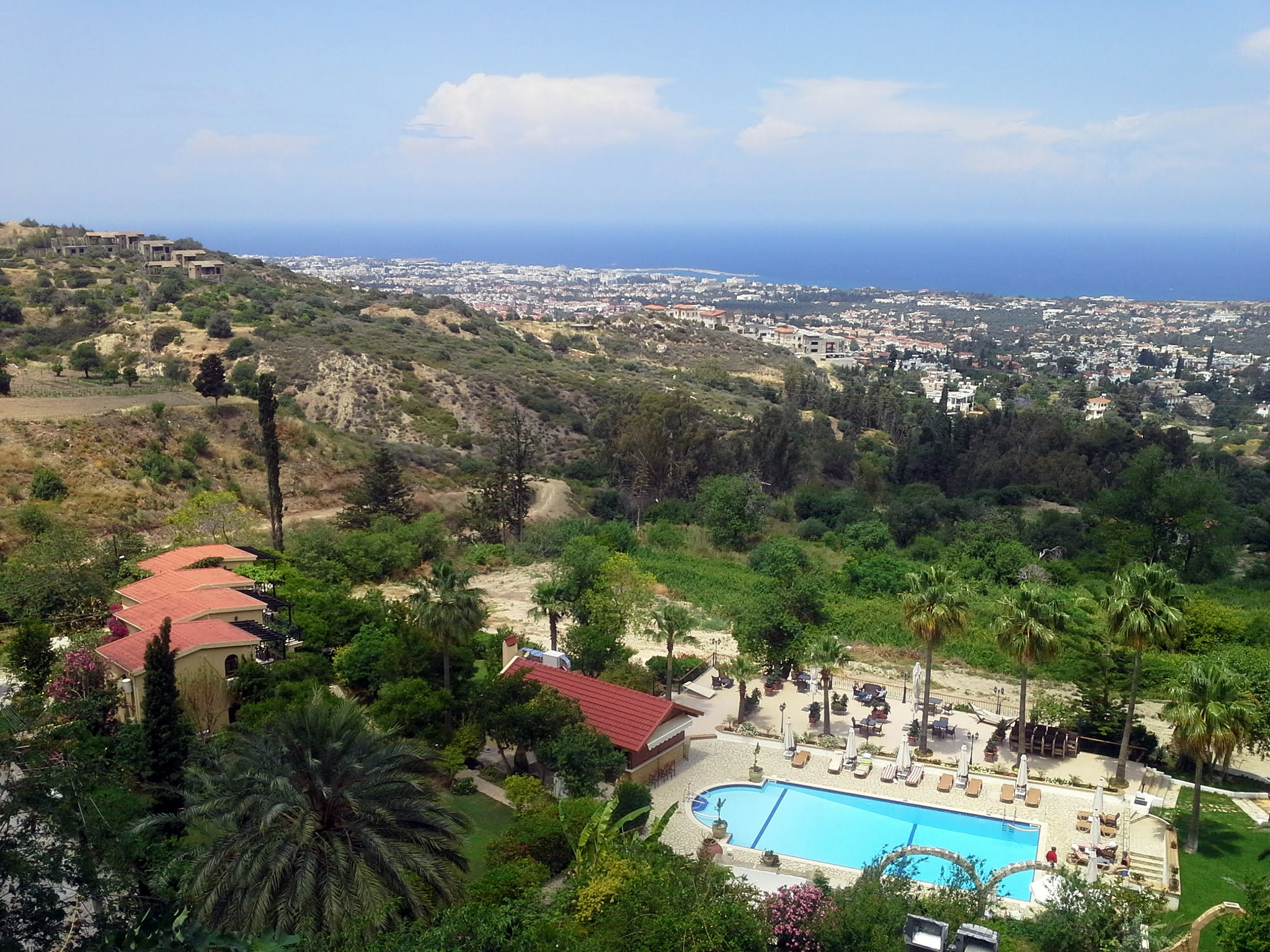 Girne